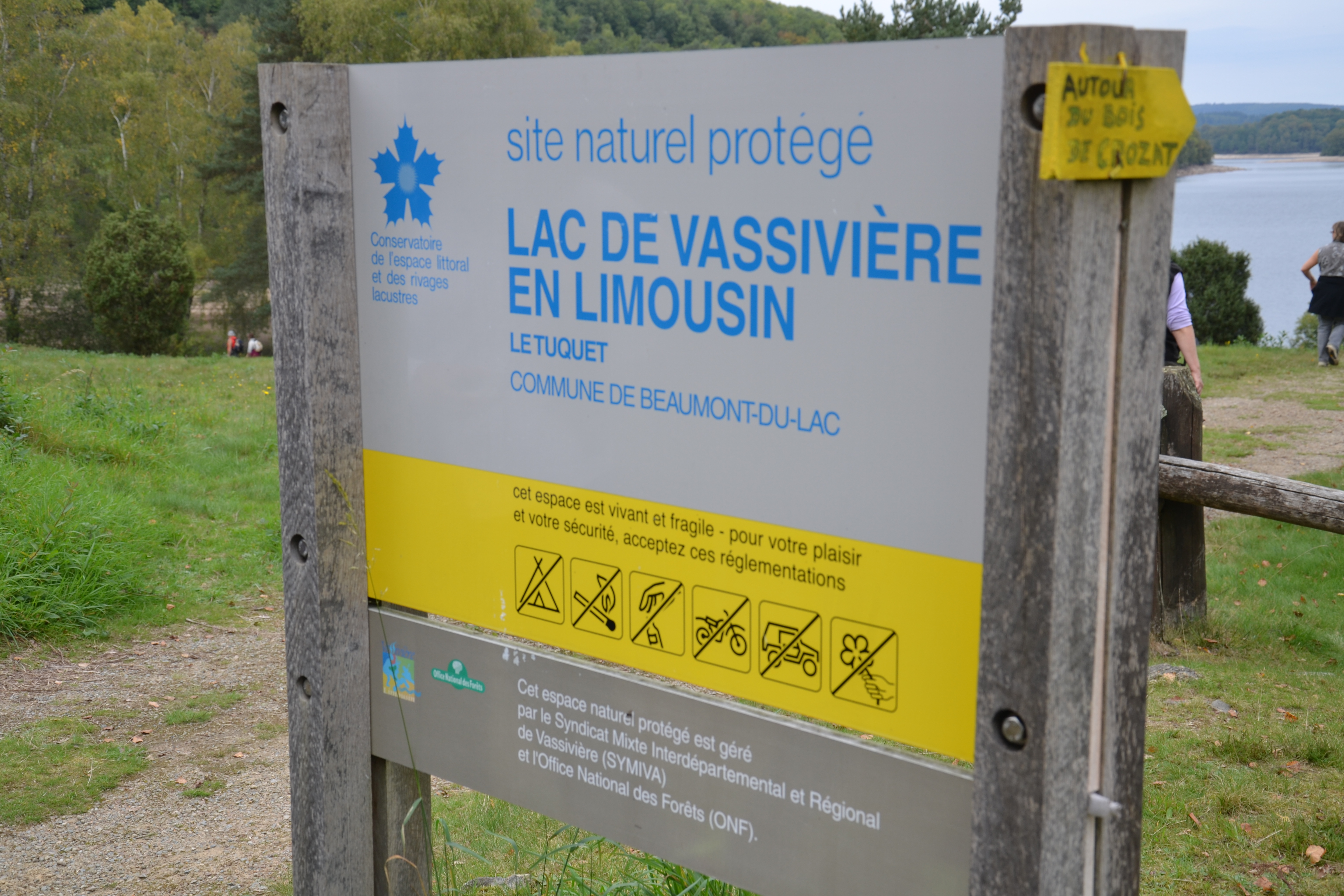 Panneau annonçant le site naturel du Lac de Vassivière, protégé dans le cadre du Conservatoire du littoral (Haute-Vienne/Creuse, France)